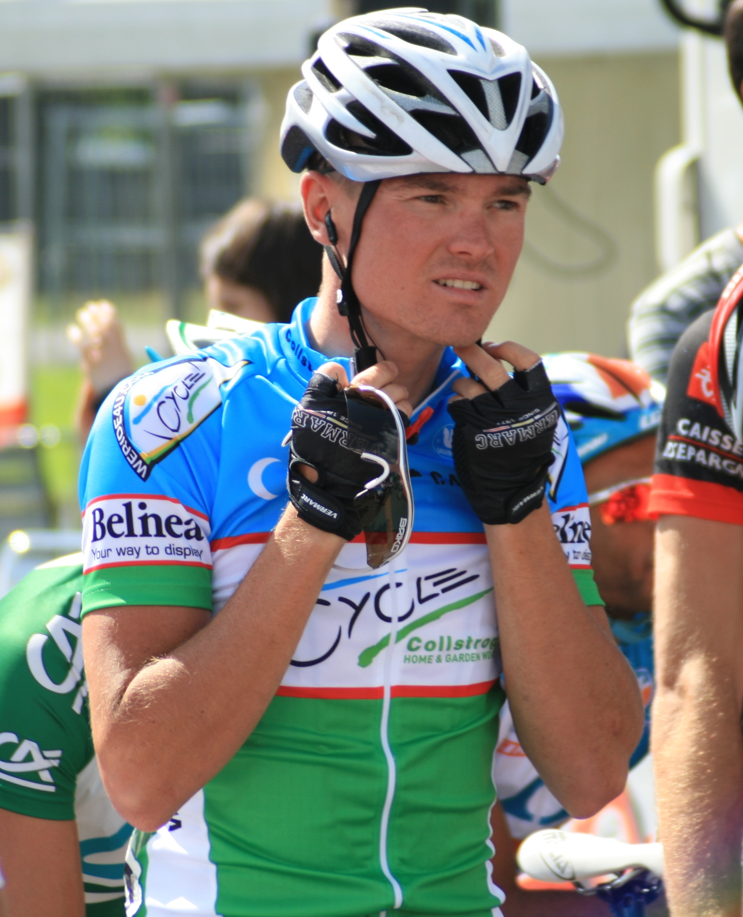 Sergey Lagutin, à l'Eneco Tour 2008, à Ardooie